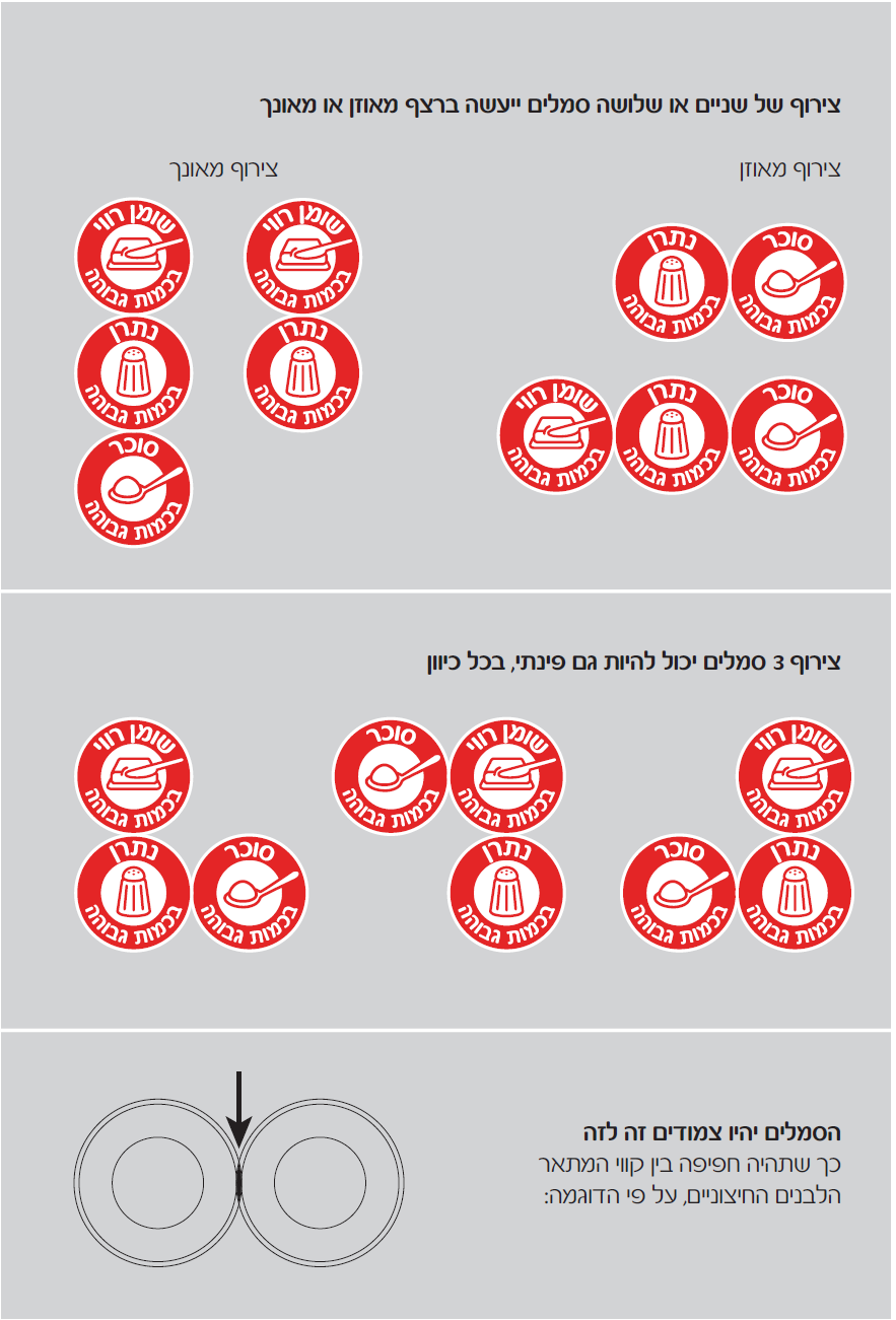 תקנות הגנה על בריאות הציבור (מזון) (סימון תזונתי), התשע״ח–2017